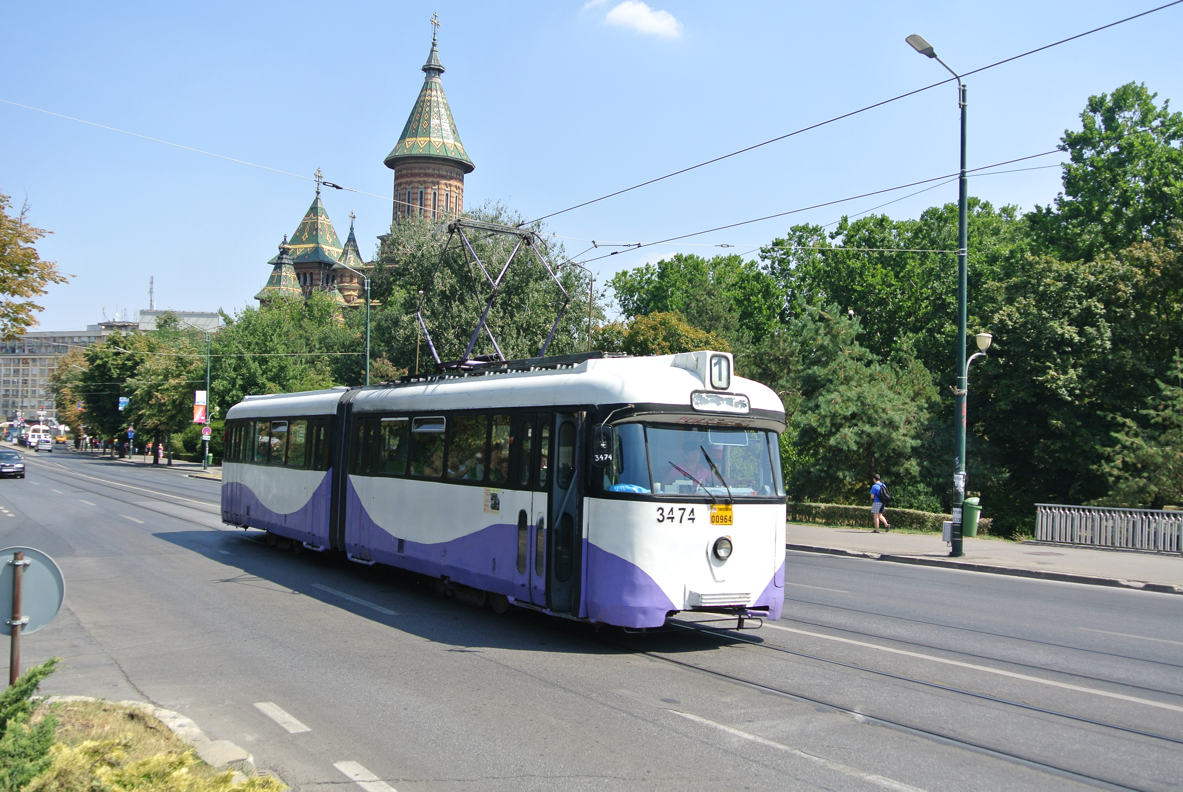 "Jednička" a pravoslavná katedrála